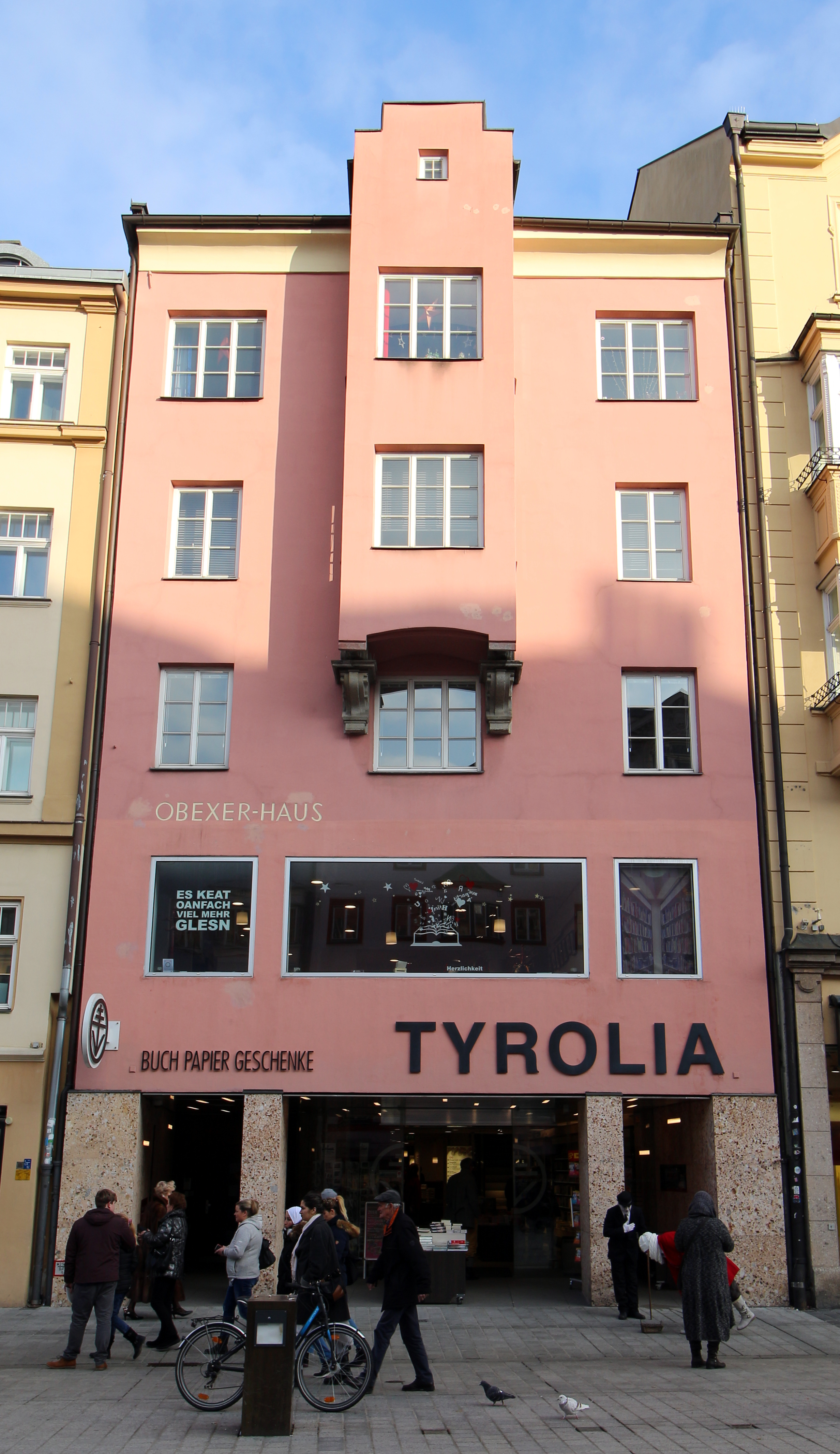 Obexer-Haus, Maria-Theresien-Straße 15, Innsbruck. This media shows the remarkable cultural object in the Austrian state of Tyrol listed by the Tyrolean Art Cadastre with the ID 116116. (on tirisMaps, pdf, more images on Commons, Wikidata)